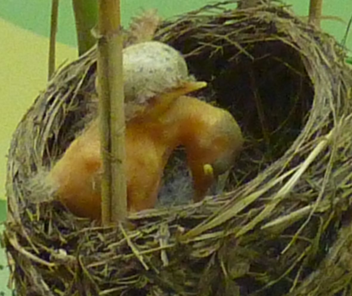 Kuckuck räumt das Nest seiner Wirtseltern aus